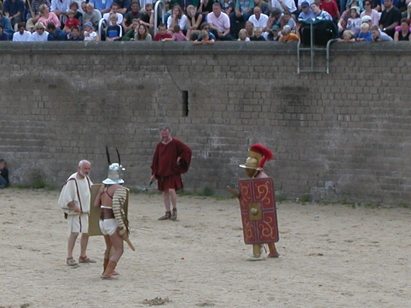 Gladiatorenschaukampf bei einem Römer-Fest in Xanten, 2003. Von Links nach Rechts: summa rudis (Schiedsrichter), provocator, Dr. Marcus Junkelmann als Moderator und murmillo.